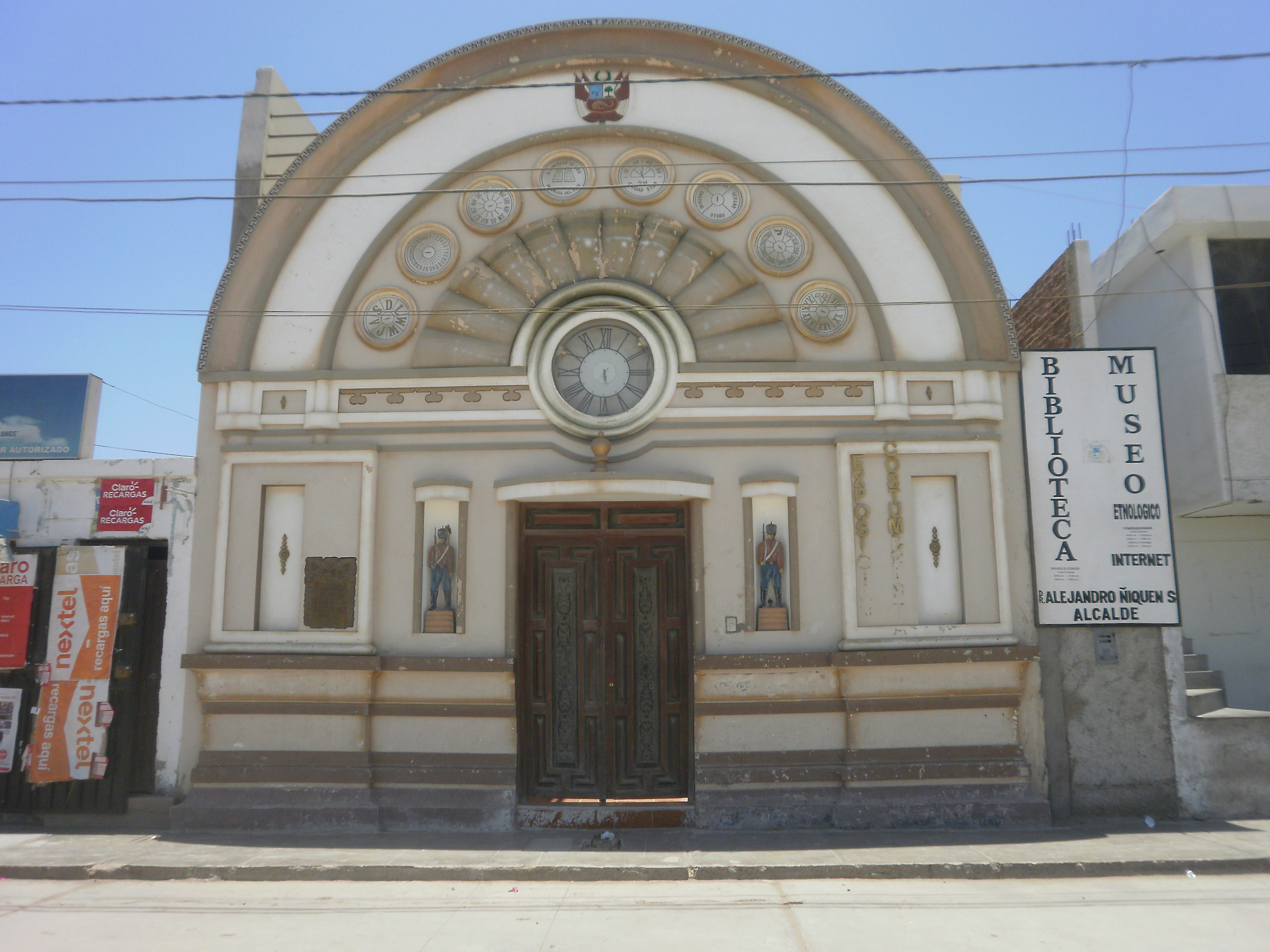 Casa donde nació Pedro Ruiz Gallo